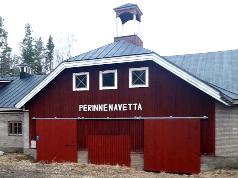 Старый скотный двор